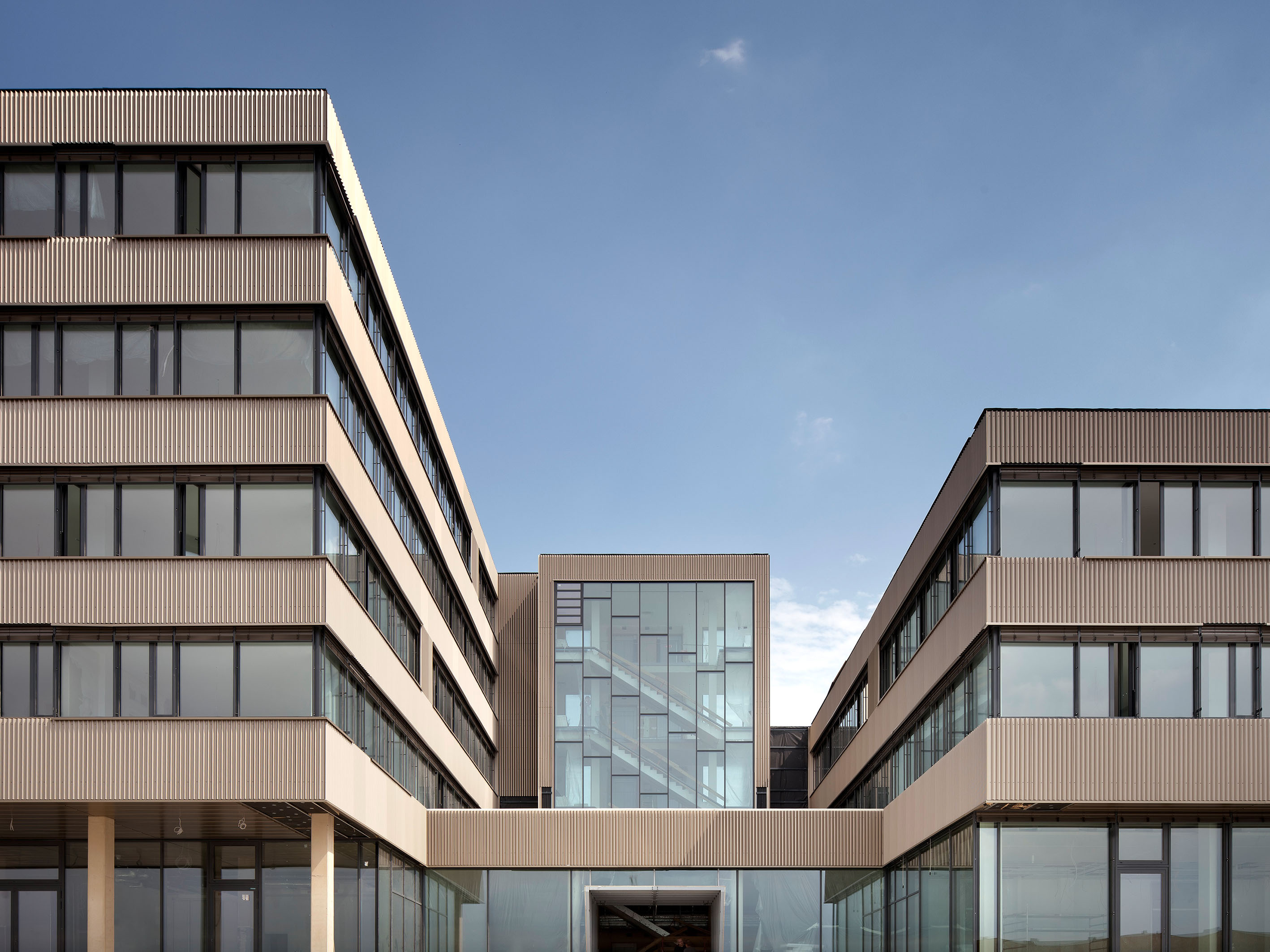 Technologiezentrum aspern IQ, Wien (Österreich)